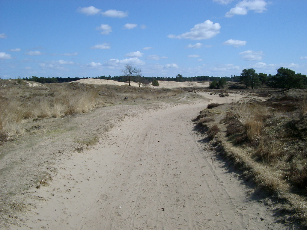 zelf gemaakte foto